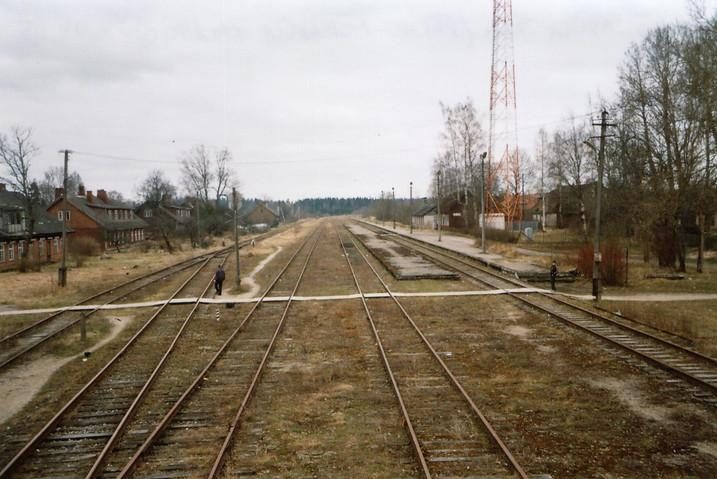 Mõisaküla raudteejaam vaatega lõunasse.